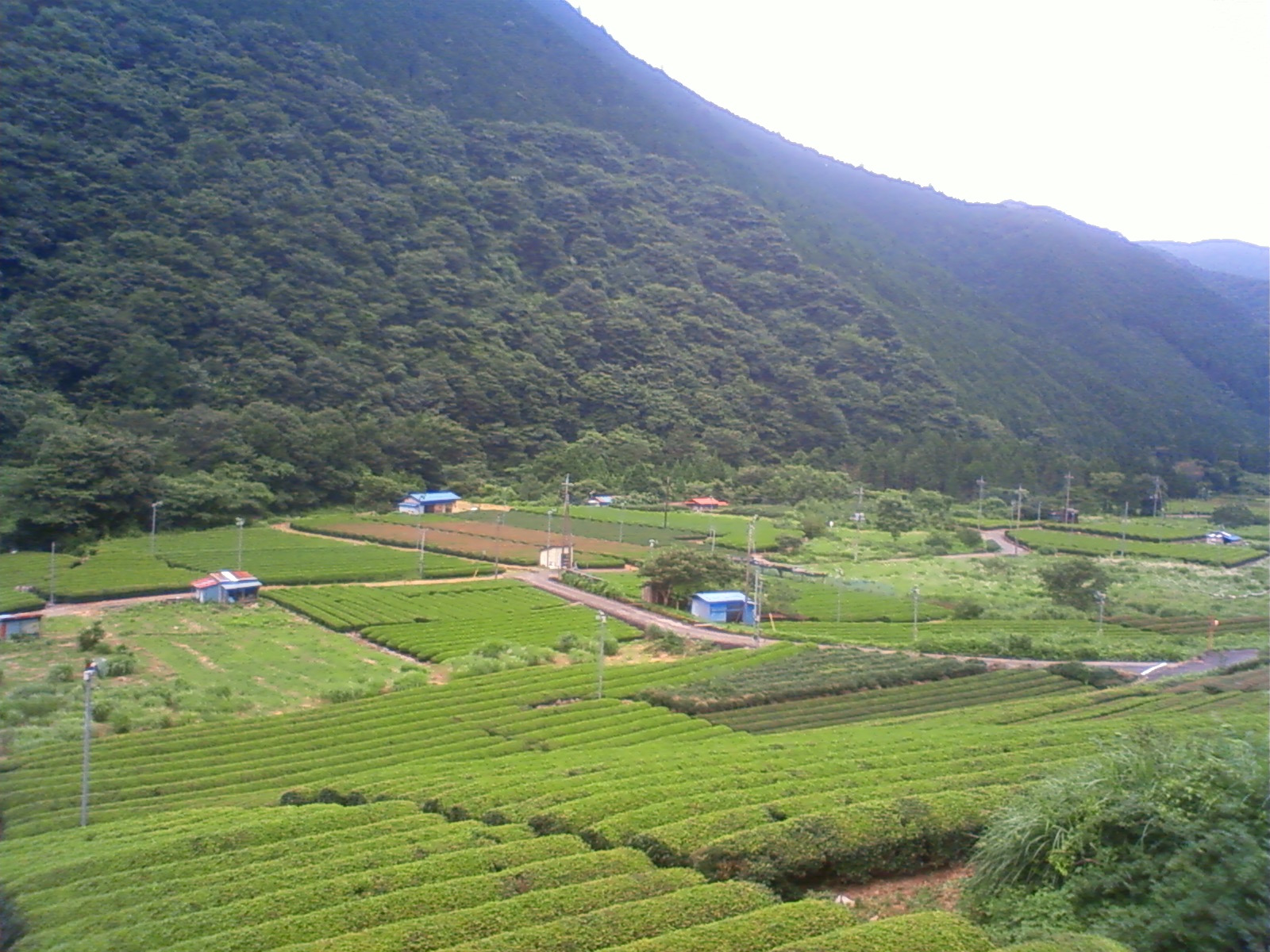 山梨県南巨摩郡南部町。茶畑（本村）。